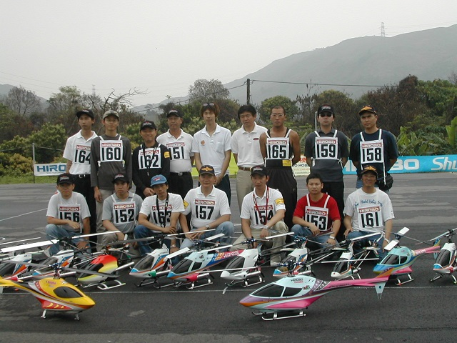 2002香港模型及直升機大賽